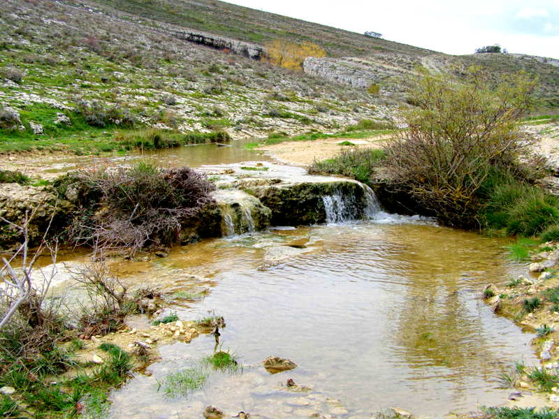 Río Odra - Burgos - España